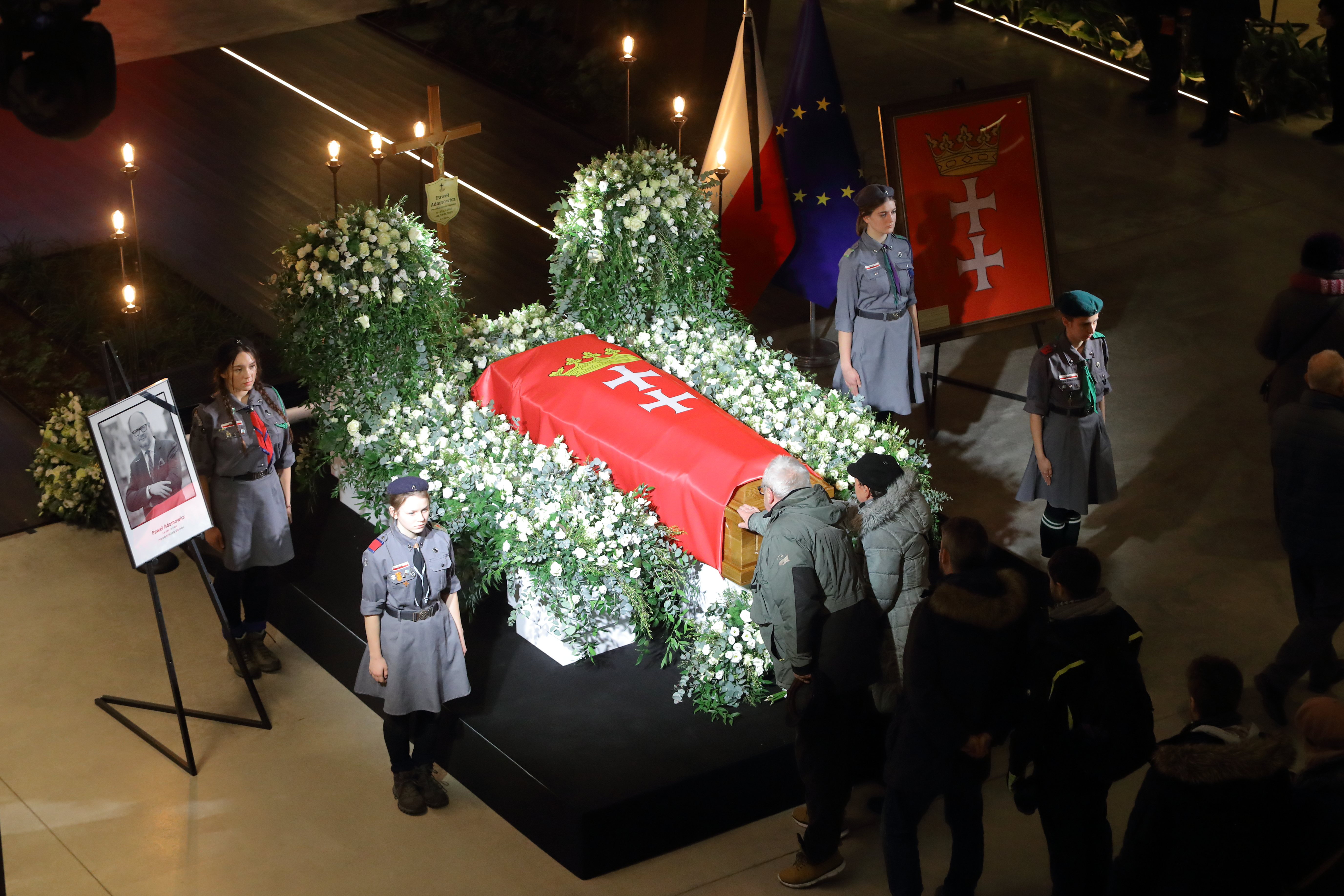 Pożegnanie Pawła Adamowicza w Europejskim Centrum Solidarnosci - trumna z ciałem Prezydenta wystawiona w ogrodzie zimowym ECS